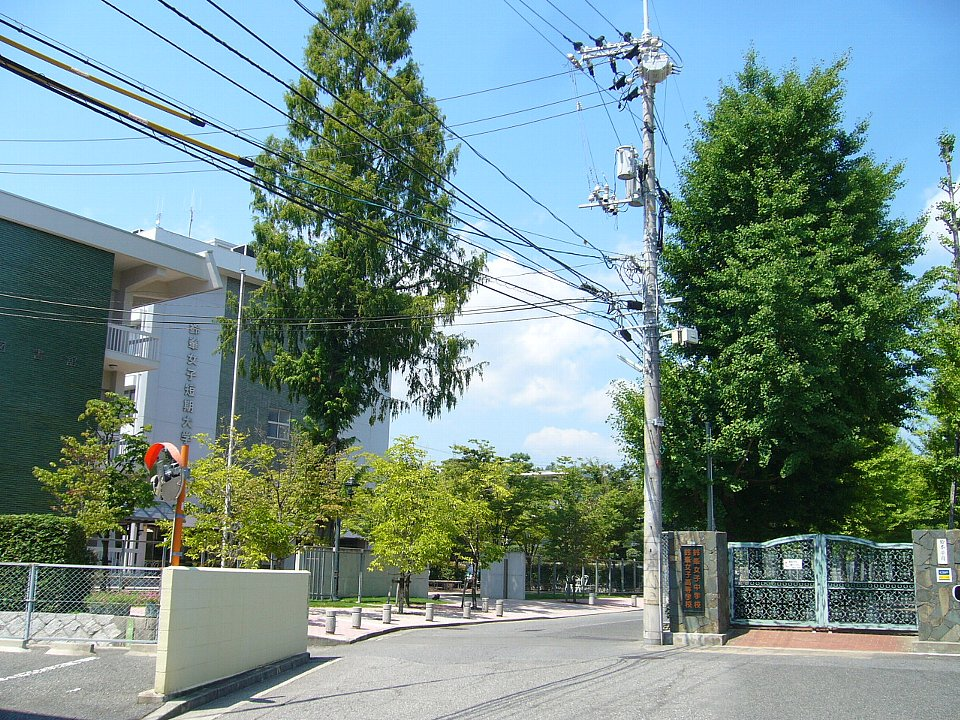 鈴峯学園（広島市西区） 右が鈴峯女子高等学校･中学校、中央が鈴峯女子短期大学 左は付属図書館 2006年8月23日 Bakkai撮影 Category:広島市の画像ja:Category:大学の画像ja:Category:高等学校の画像